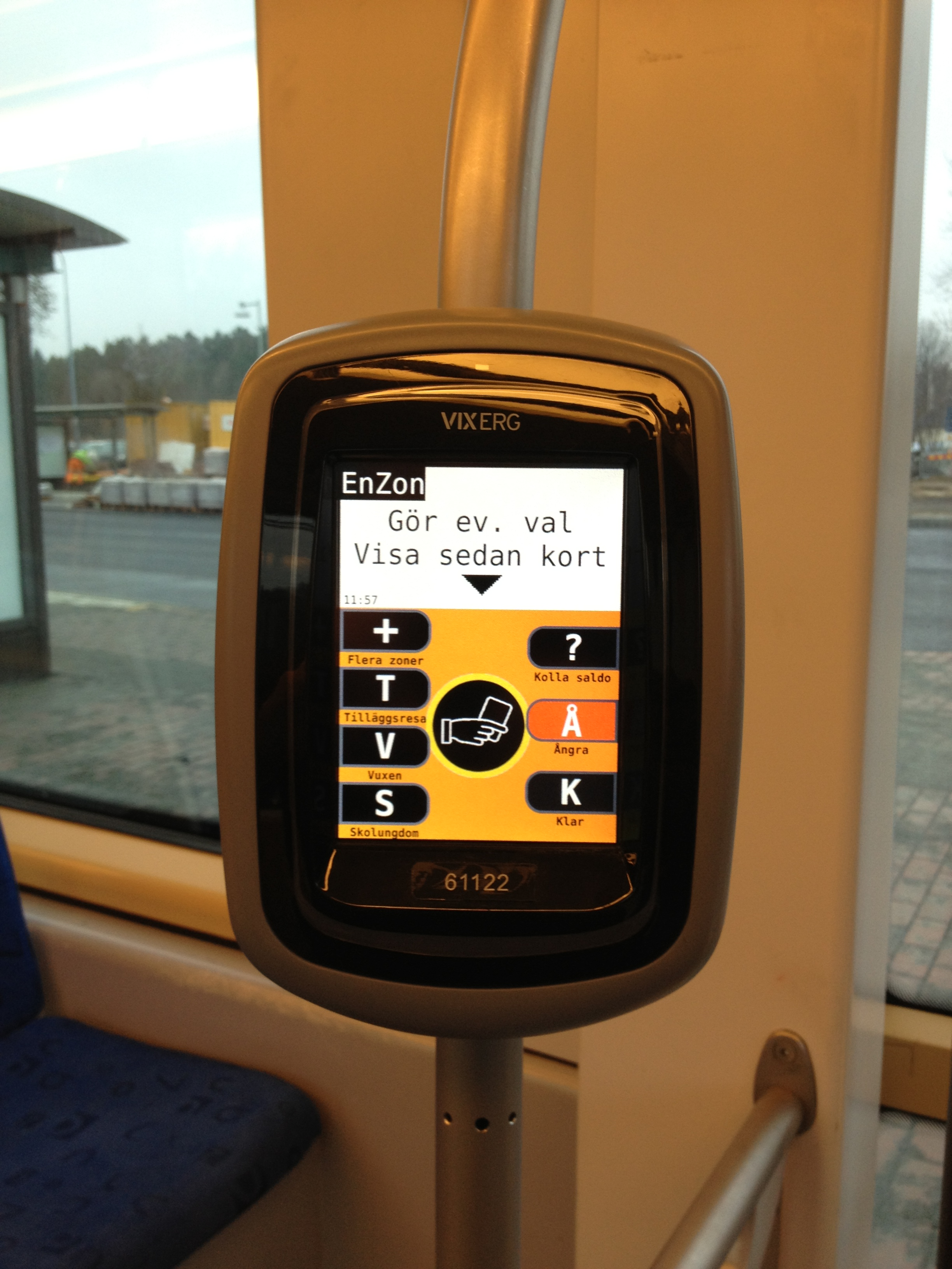 Den nya stämpelmaskinen i sirio spårvagnen